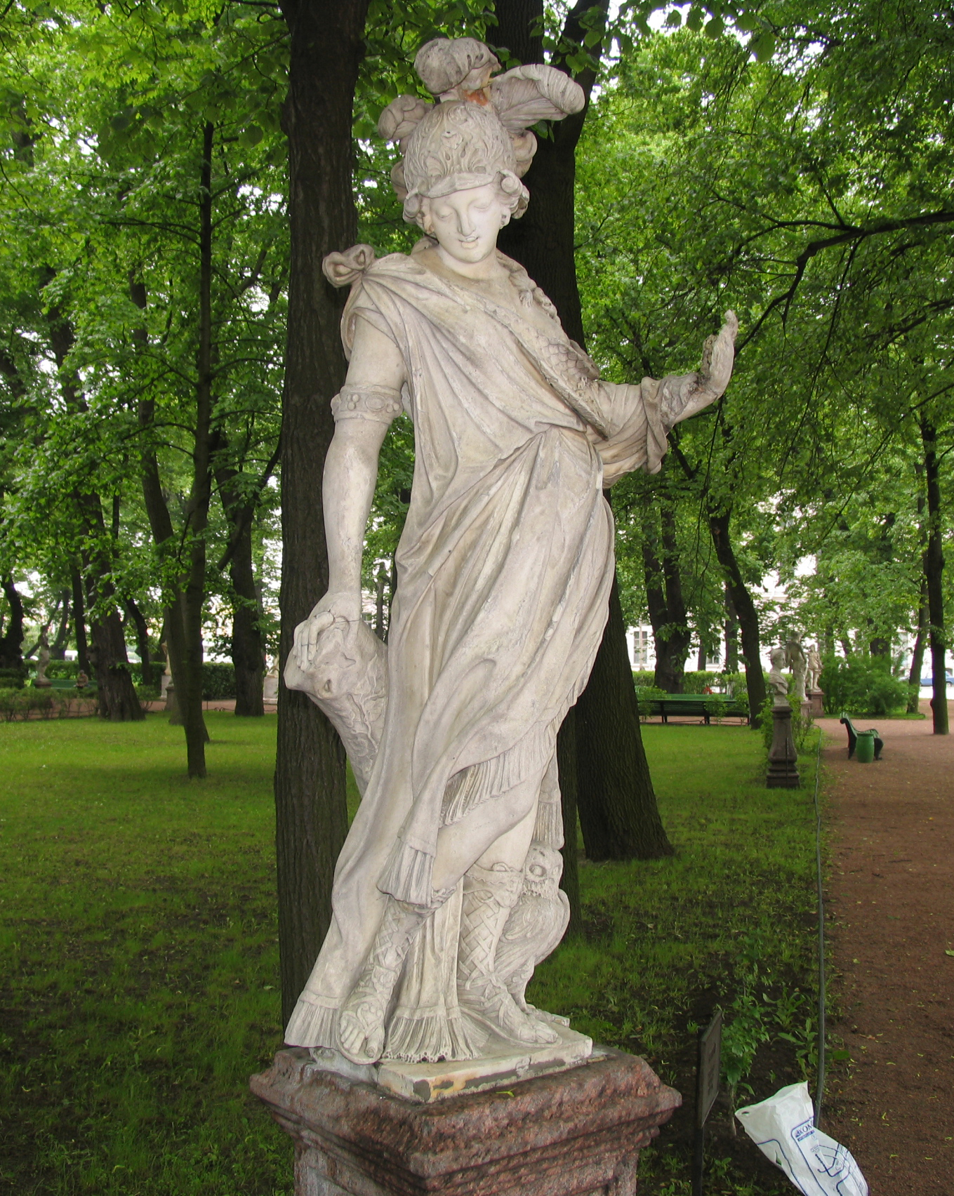 Летний сад - Статуя "Минерва" До реставрации Фото 2005 года